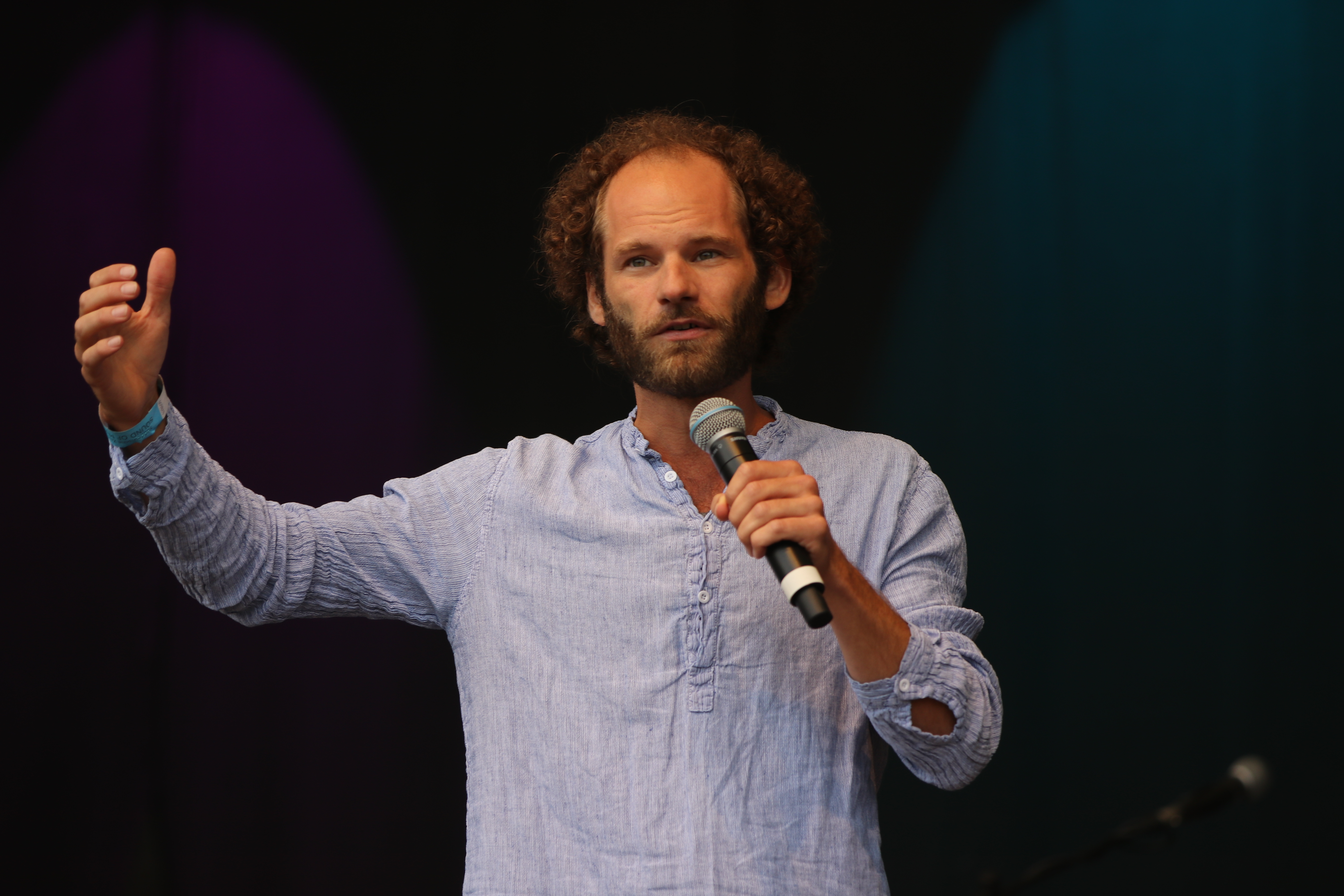 Ausgehetzt, Demonstration in München am 22. Juli 2018 gegen den Rechtsruck in der bayerischen Politik